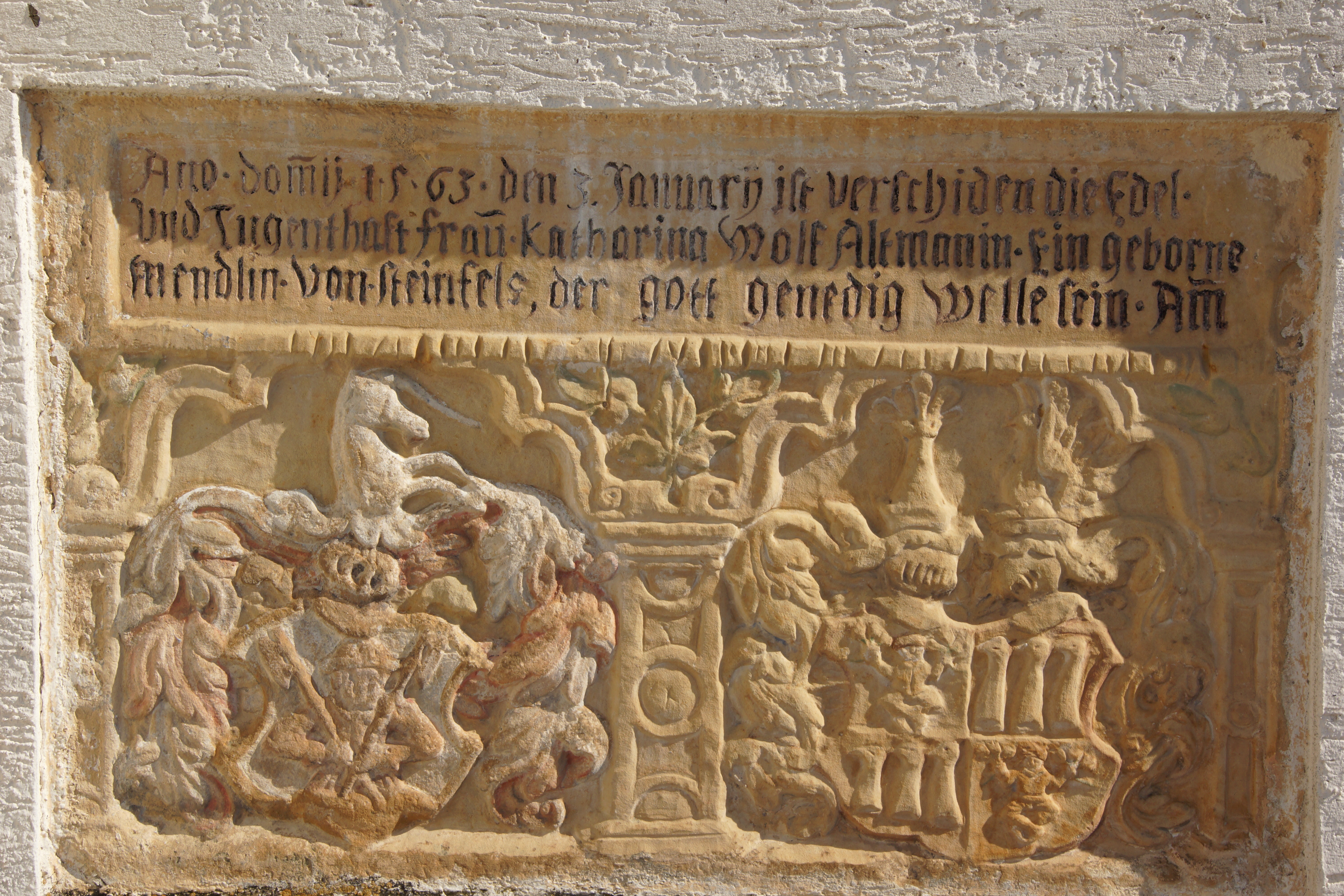 Der Kirchberg in Vilshofen in der Oberpfalz